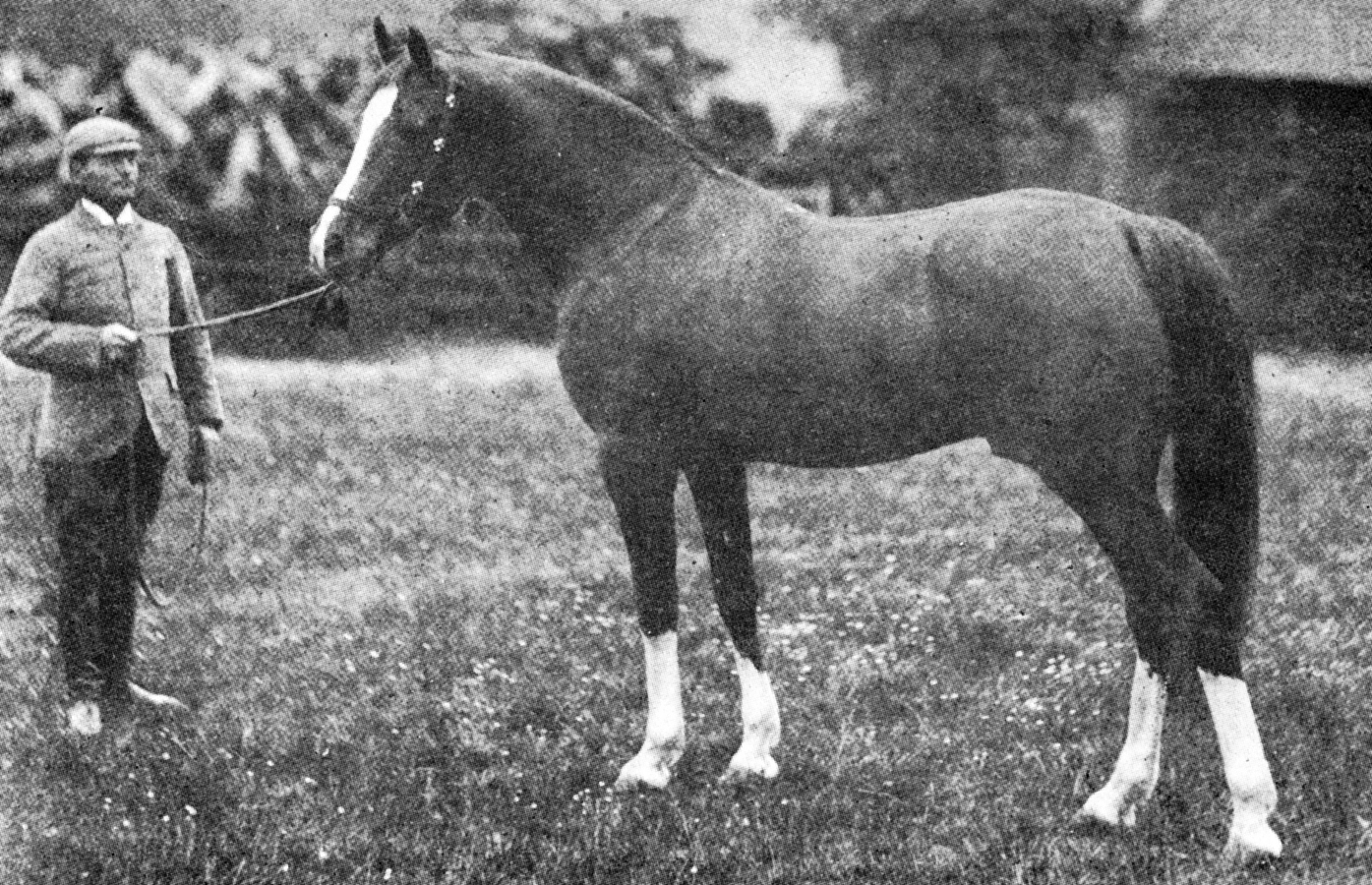 Mesaoud, an Arabian stallion